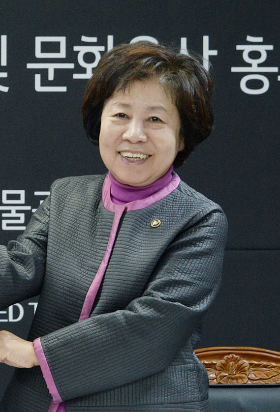 LG전자-문화재청, ‘문화재지킴이’ 협약식 개최 (나선화)